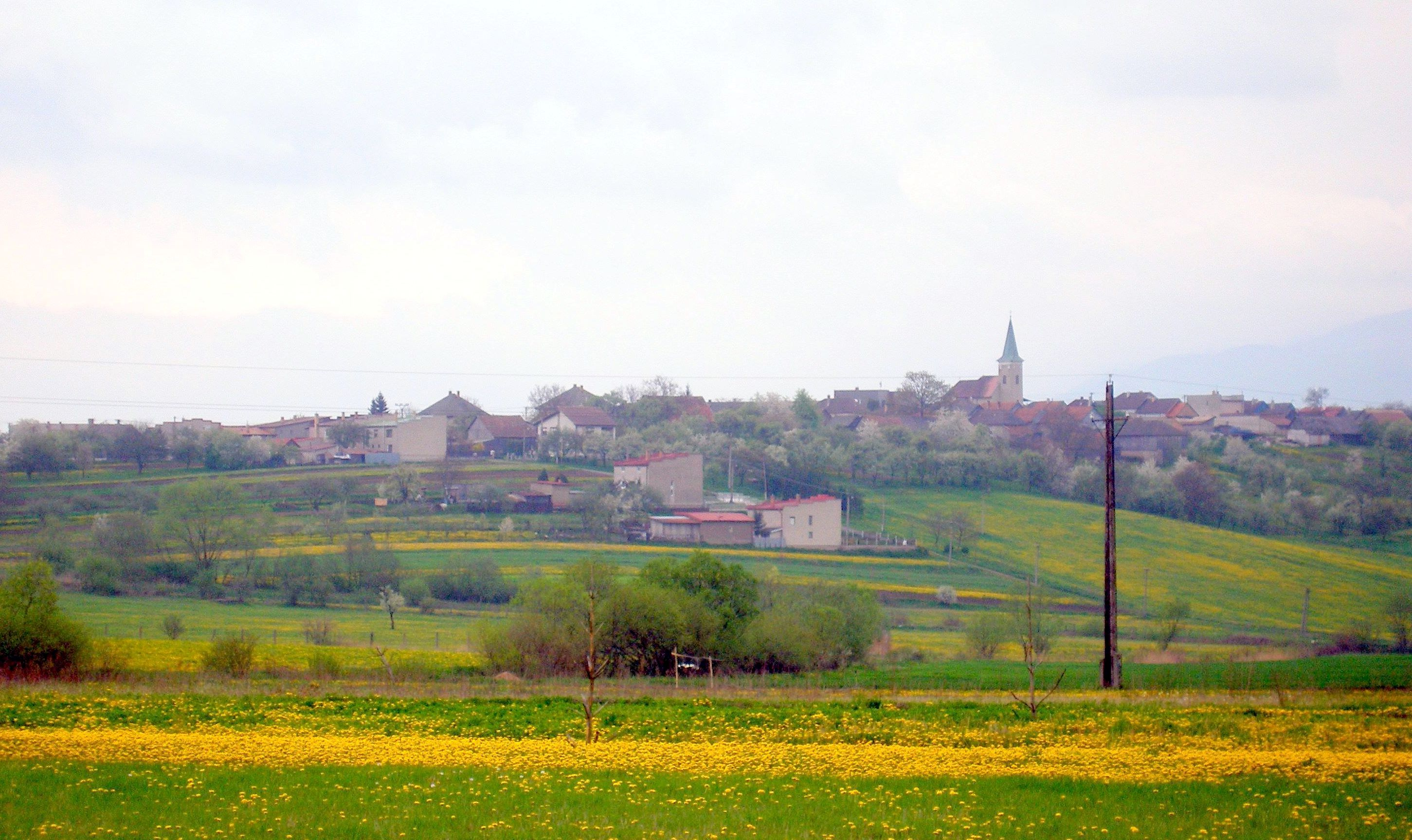 Obec Veľký Slivník okres Prešov región Šariš